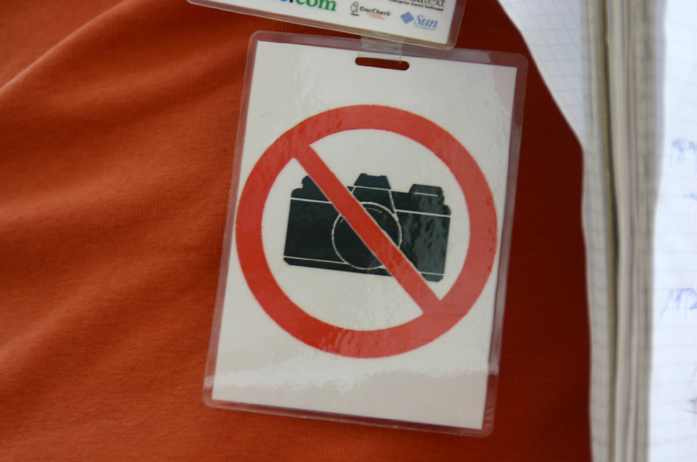 Wikimania 2005 author: Elke Wetzig (User:Elya)